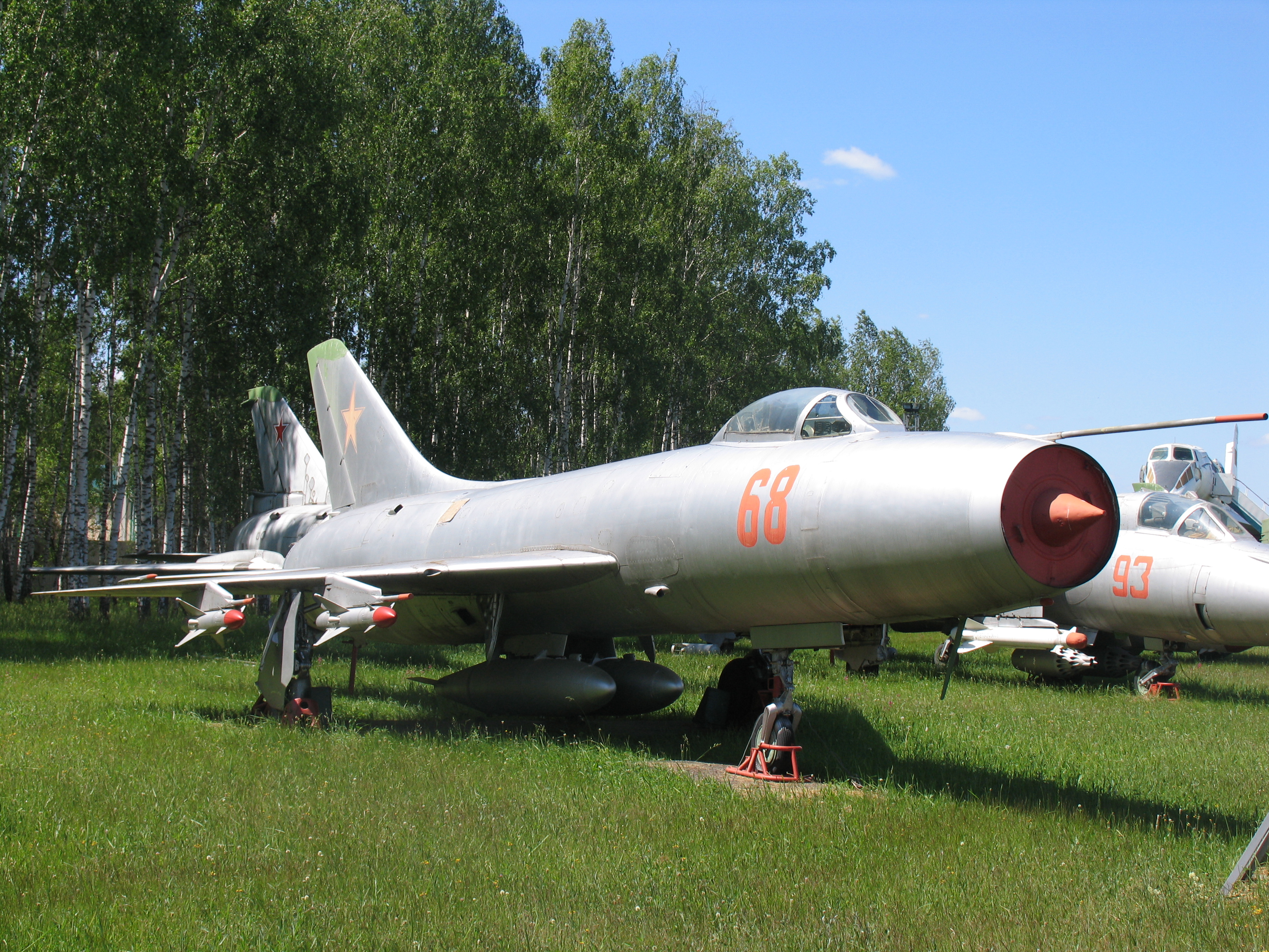 Су-9Б. Изготовлен в августе 1959 года. С 24 сентября 1959 года по 15 сентября 1960 года эксплуатировался ВВС СССР. Выполнил 52 полёта, налетав 30 часов 25 минут. В музей передан 1 сентября 1969 года.